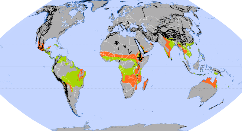 Auszug der Karte Ökozonen nach Jürgen Schultz